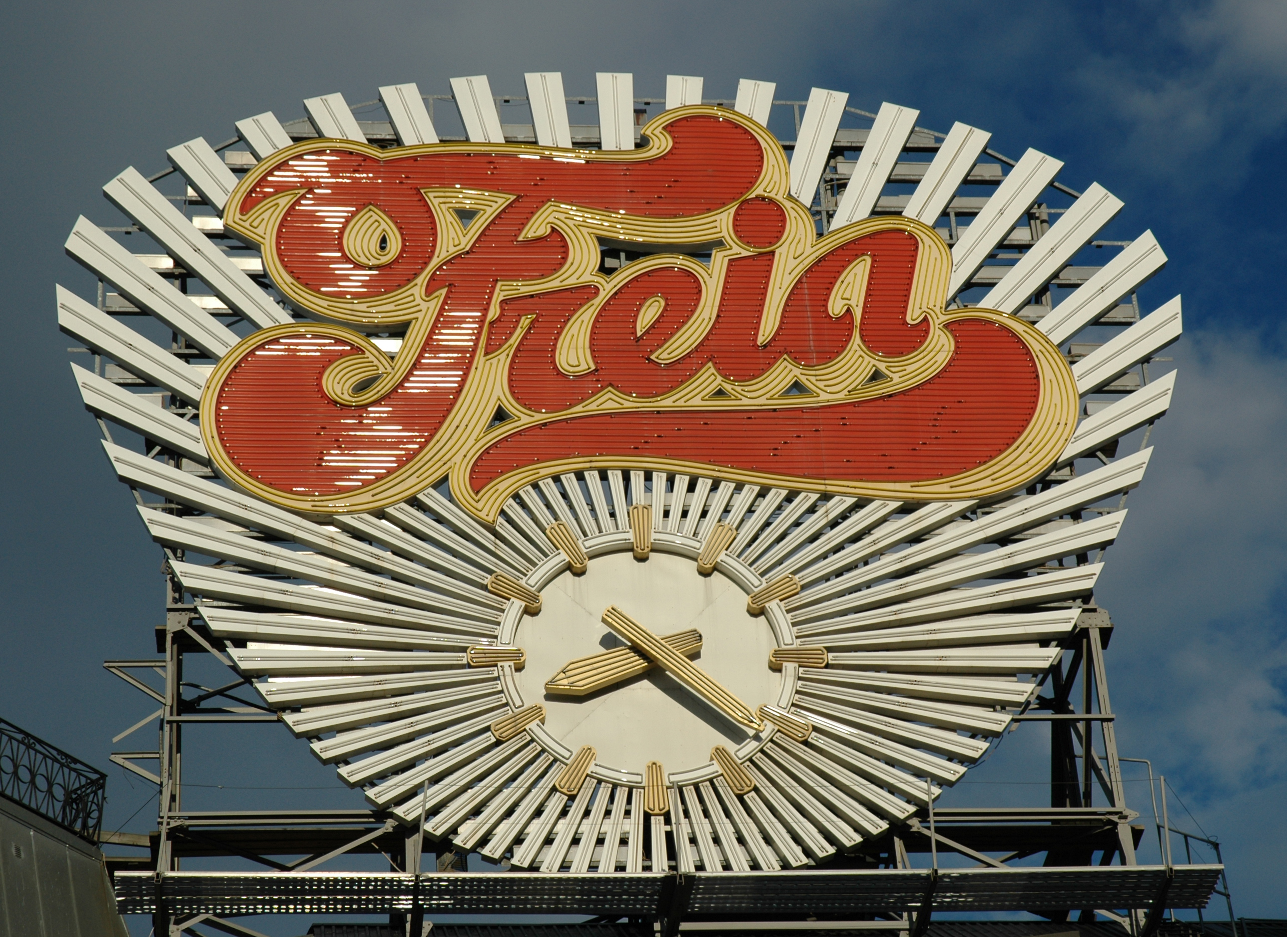 Freiauret, Egertogert, Oslo